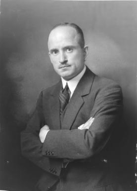 książę (1860-1934)